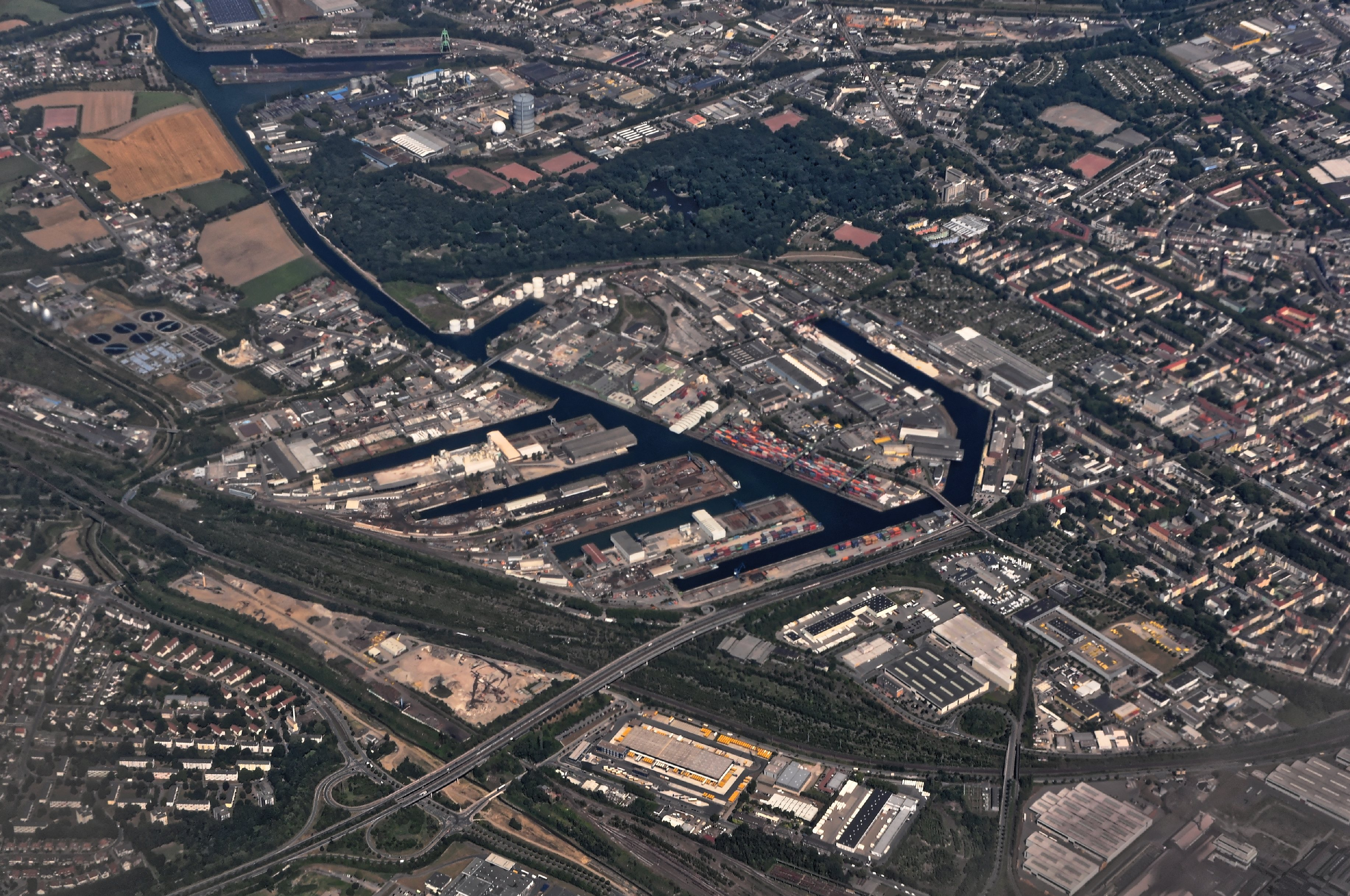 Bilder vom Flug -Rom-Düsseldorf-Hamburg 2013 Dieses Foto entstand in Zusammenarbeit mit Stadtbesichtigungen.de Die Seiten Stadtbesichtigungen.de, der dazugehörige Reise Blog sowie die Facebookseite: Stadtbesichtigungen Rom dürfen dieses Bild für Ihre Veröffentlichungen ohne den Hinweis auf Wikipedia, Commons bzw der Lizenz verwenden. Die Verantwortlichen habe von mir (Ra Boe) die Originaldaten zur freien Verfügung übermittelt bekommen.